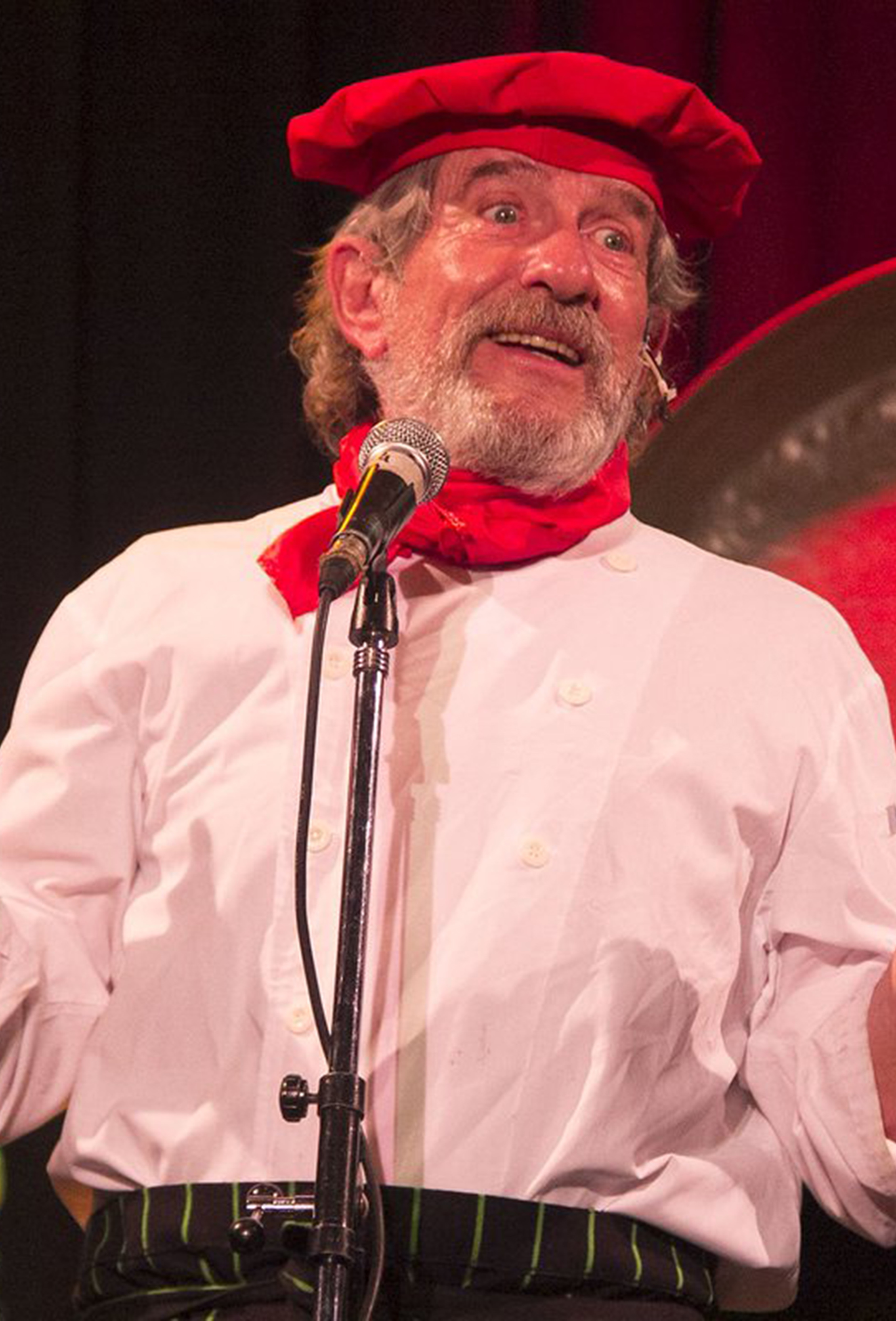 Alarcón durante la obra "El cocinero" en 2019